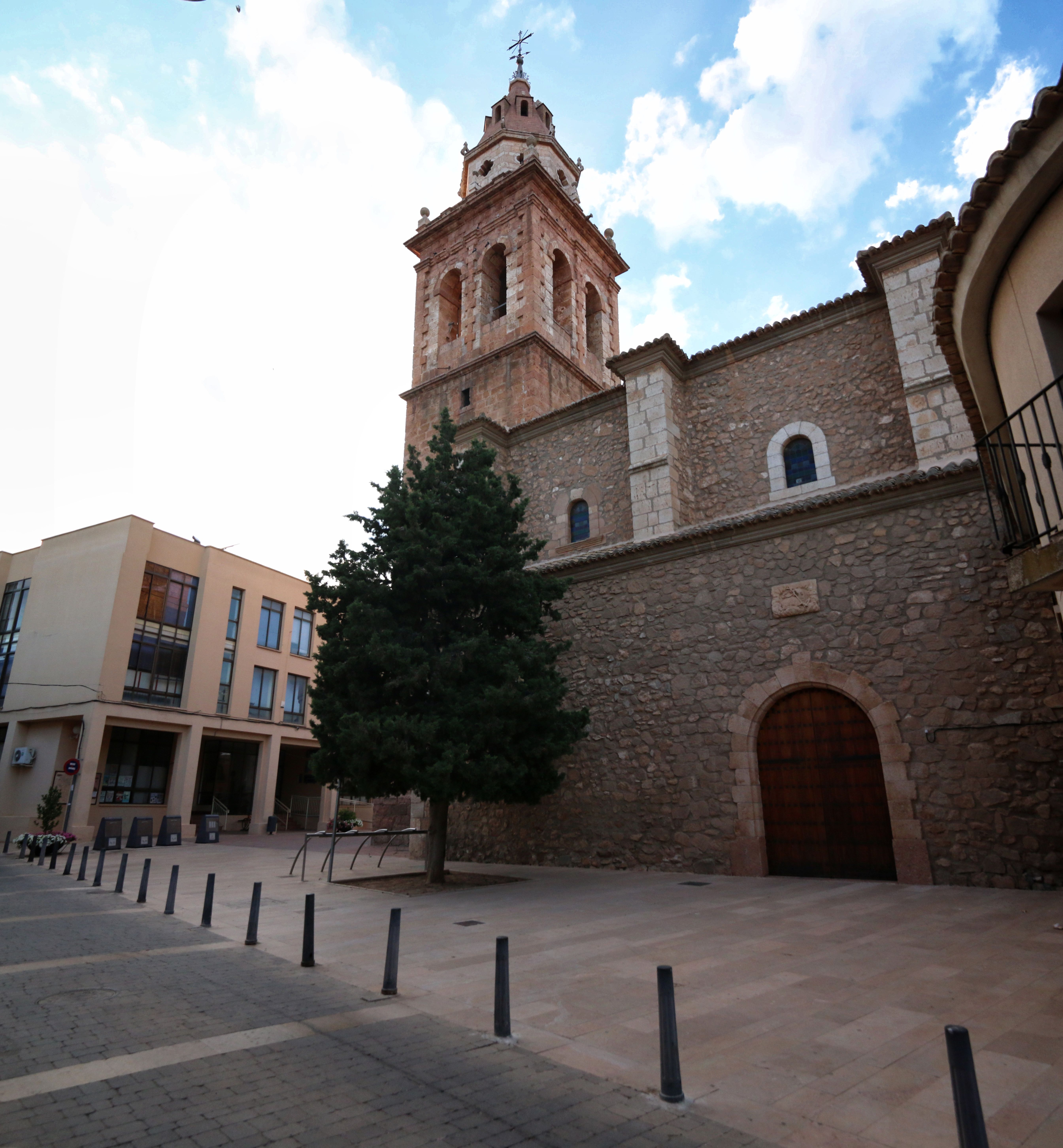 Publicado en Facebook el 9 de agosto de 2016: «El otro día, el Instituto de Estudios Albacetenses me pidió unas fotografías -actuales y de época- para ilustrar los cuarteles y oficinas de las Brigadas Internacionales en Casas-Ibáñez durante la Guerra Civil. Os proporciono el enlace del mapa que han elaborado para que curioseéis y, sobre todo, aprendáis. En Casas-Ibáñez, se apostó la XIV Brigada, integrada por franceses en su mayoría. Infantería y ametralladoras. A diferencia de los pueblos vecinos -en los que se abrieron uno o dos centros de operaciones-, en Casas-Ibáñez funcionaron hasta cinco cuarteles/oficinas».